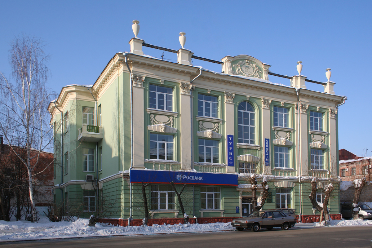 Особняк Второва в Томске (ул. Гагарина, 3)